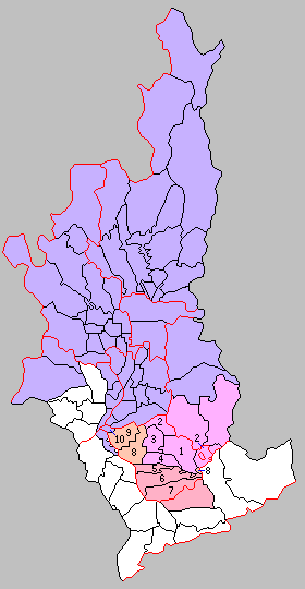 京都府久世郡の町村制時点の町村。